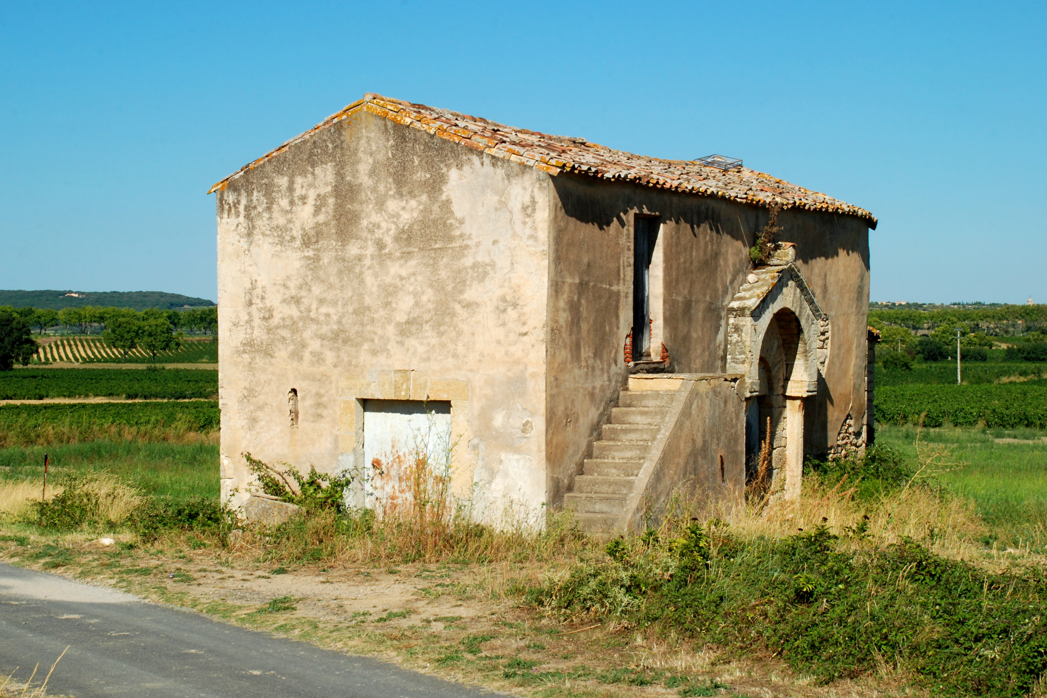 France - Languedoc - Hérault - Roujan - chapelle Saint-Nazaire